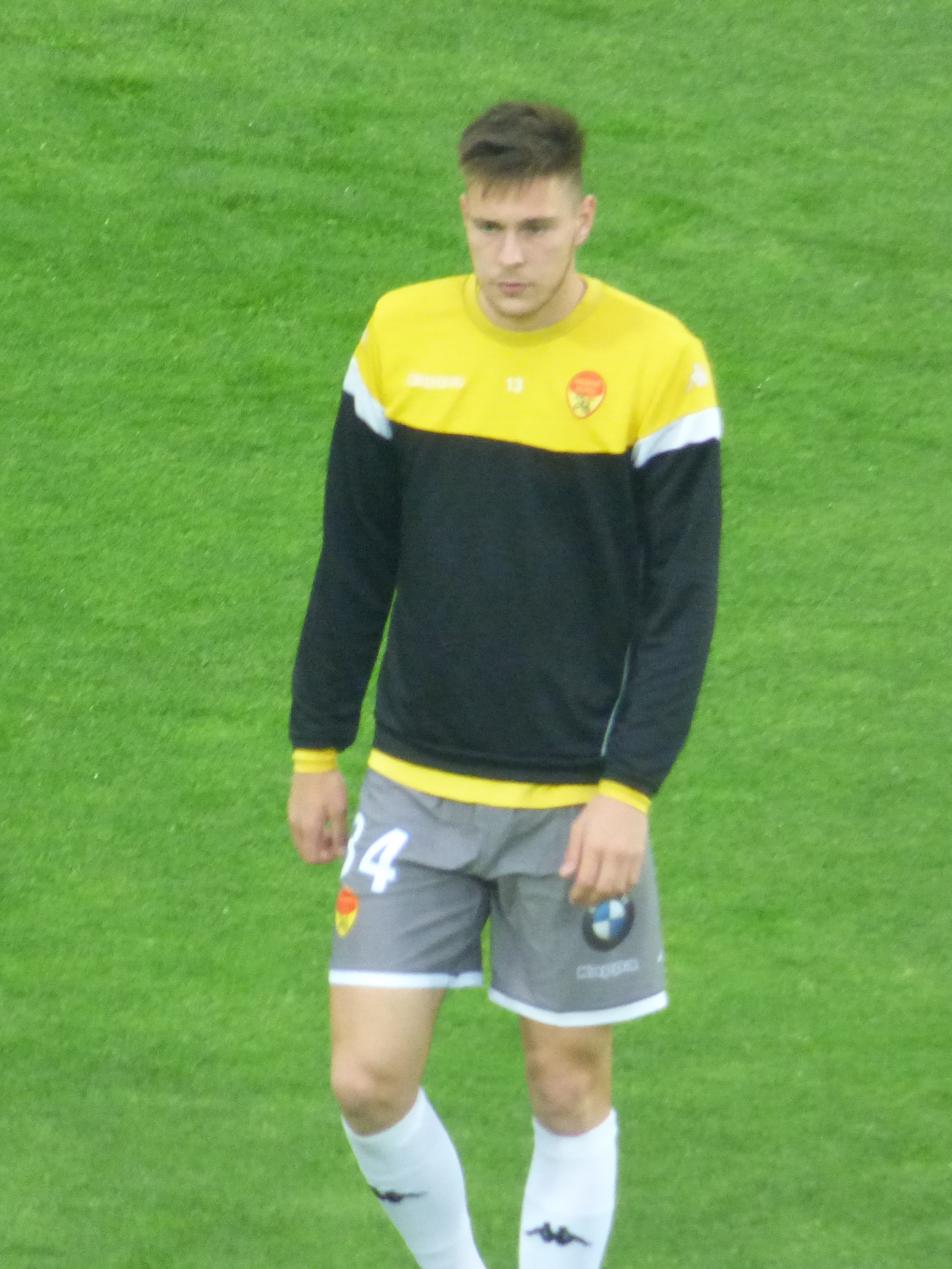 Aurélien Scheidler avant le match RC Lens / US Orléans, le 17 mai 2019, comptant pour la 38ème journée du championnat de France de football de Ligue 2 2018-2019, au Stade Bollaert-Delelis.